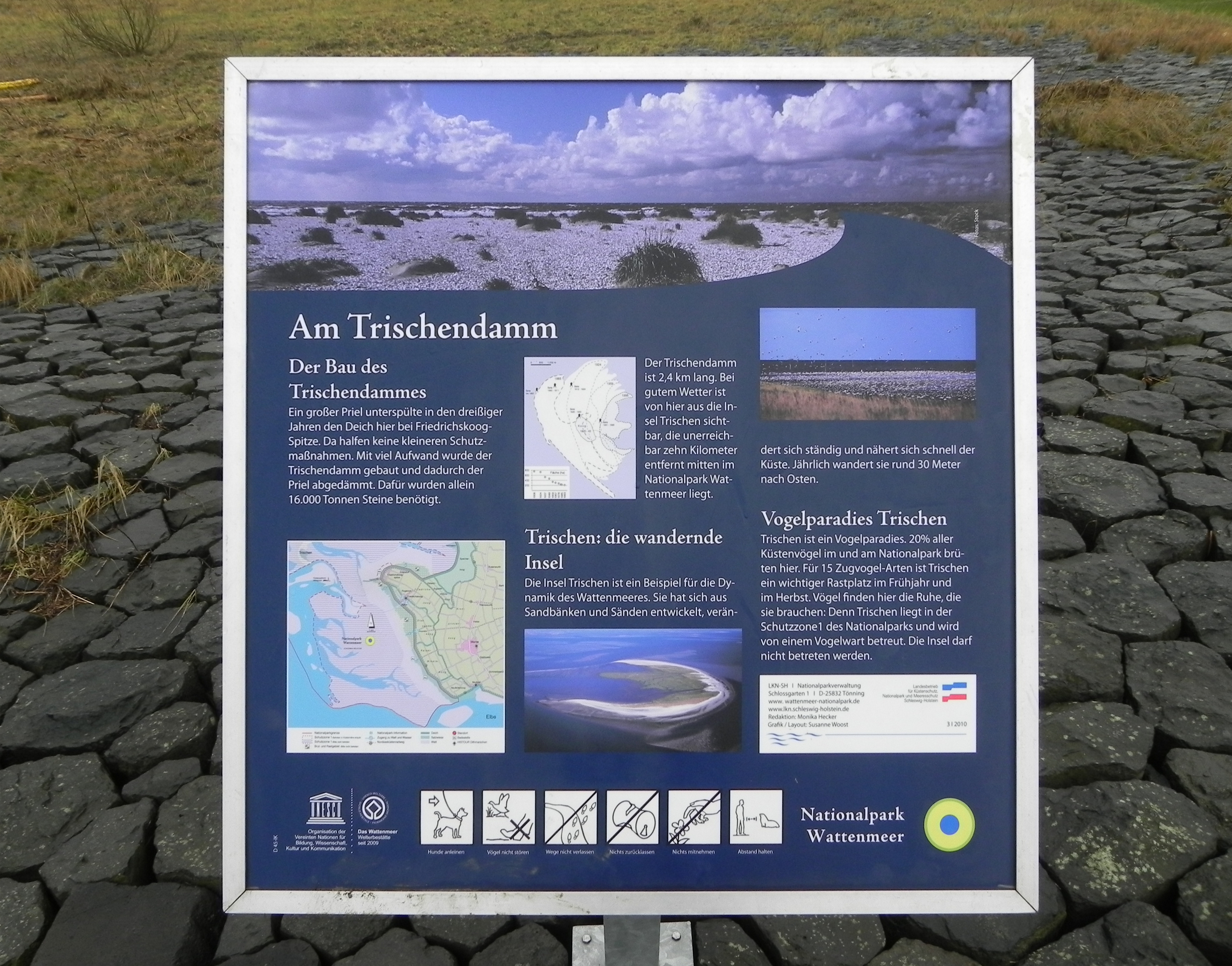 Hinweisschild am Damm